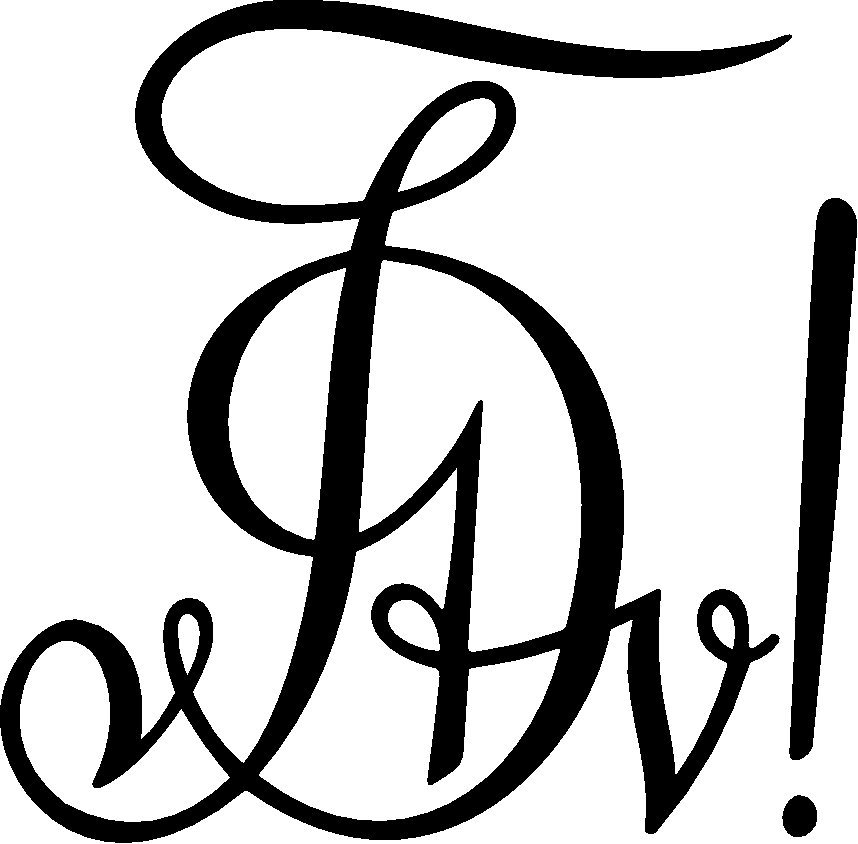 Verbandszirkel des Verbands der Vereine Deutscher Studenten (Kyffhäuserverband)